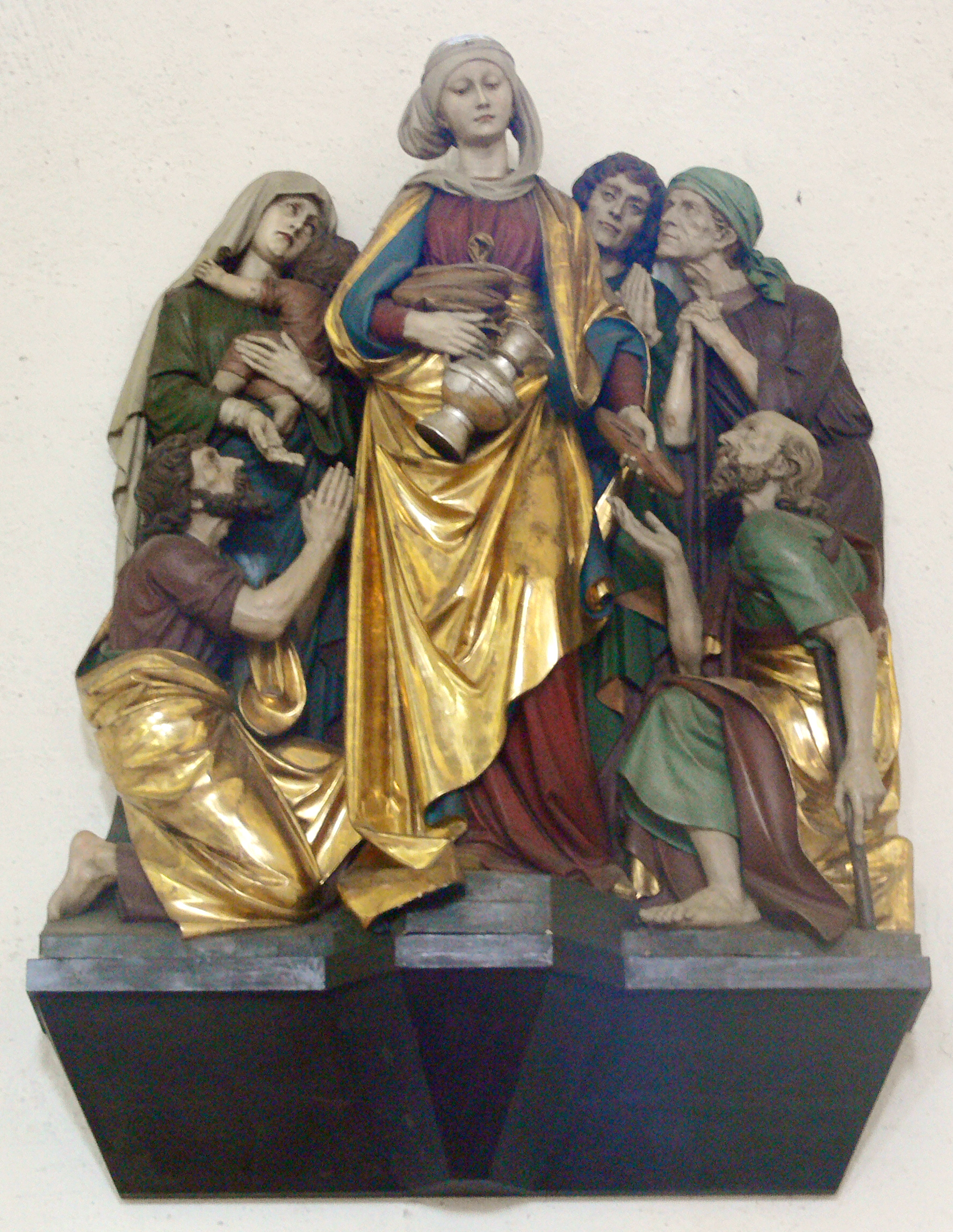 Salzburg, Andräkirche Elisabethaltar von A. Winkler (Mittelteil; einzig erhaltener Rest des Altars nach der Zerstörung der Kirche im Zweiten Weltkrieg), 1899